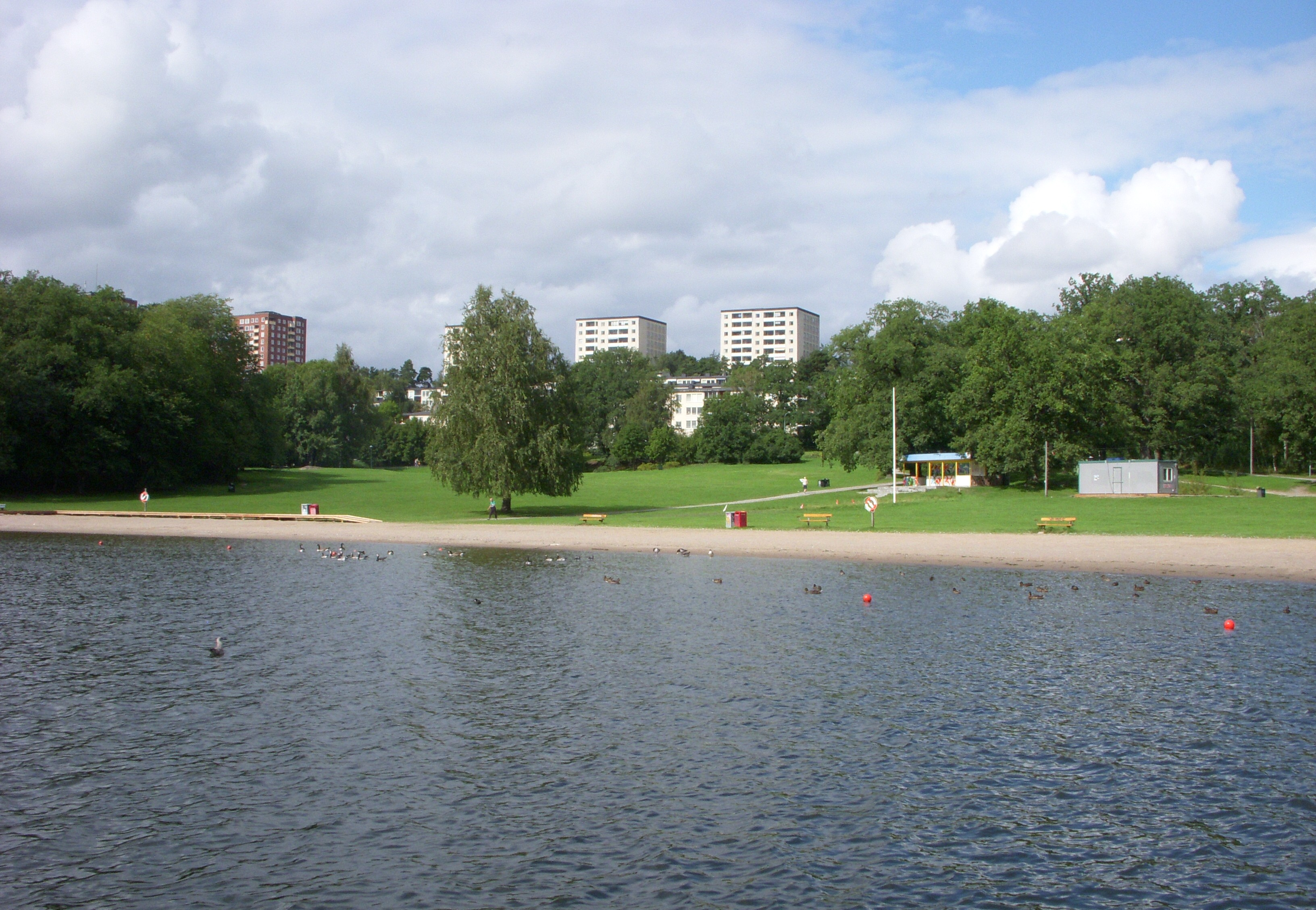 Maltesholmsbadet i Hässelby strand